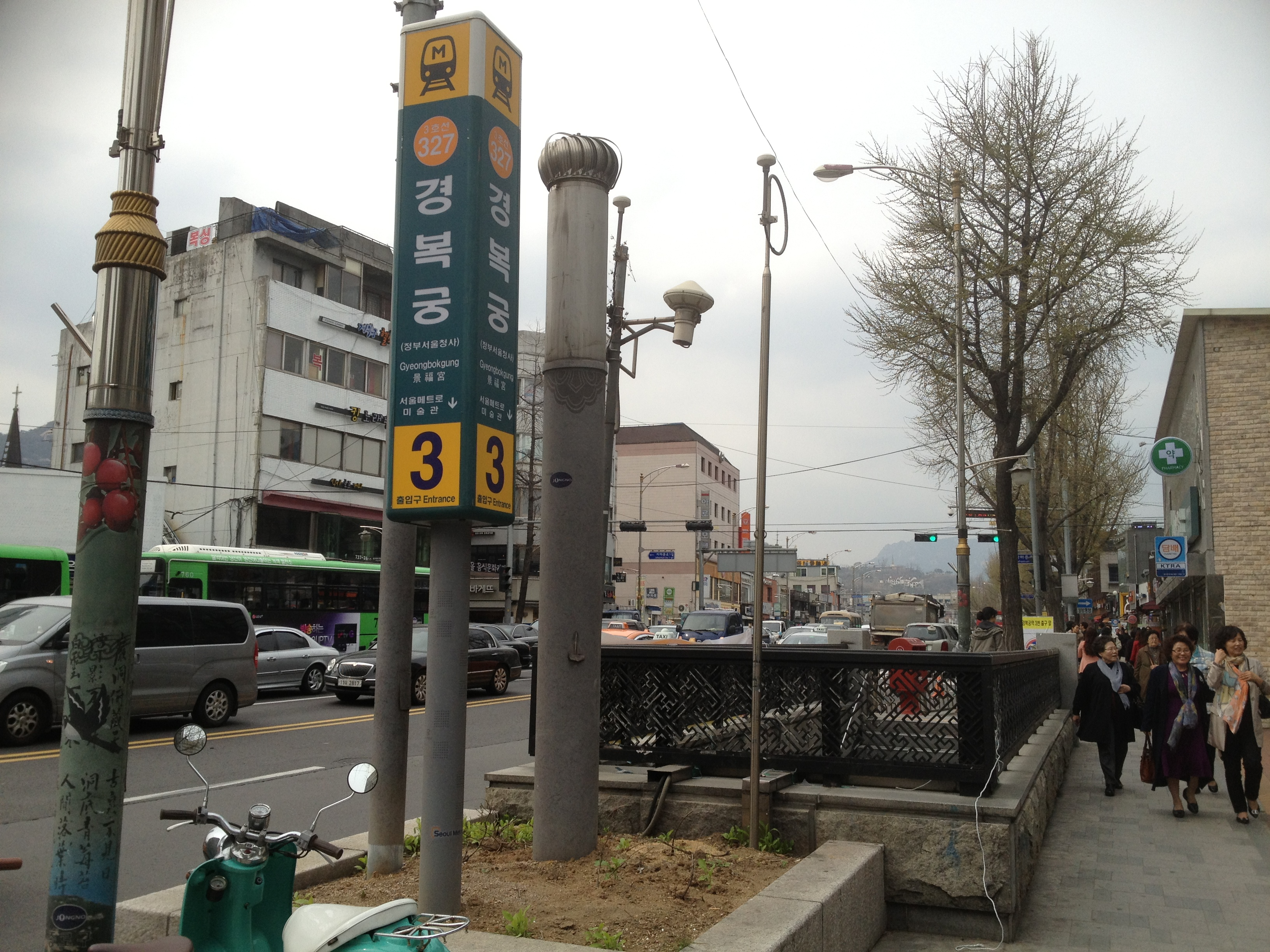 경복궁역 3번 출구